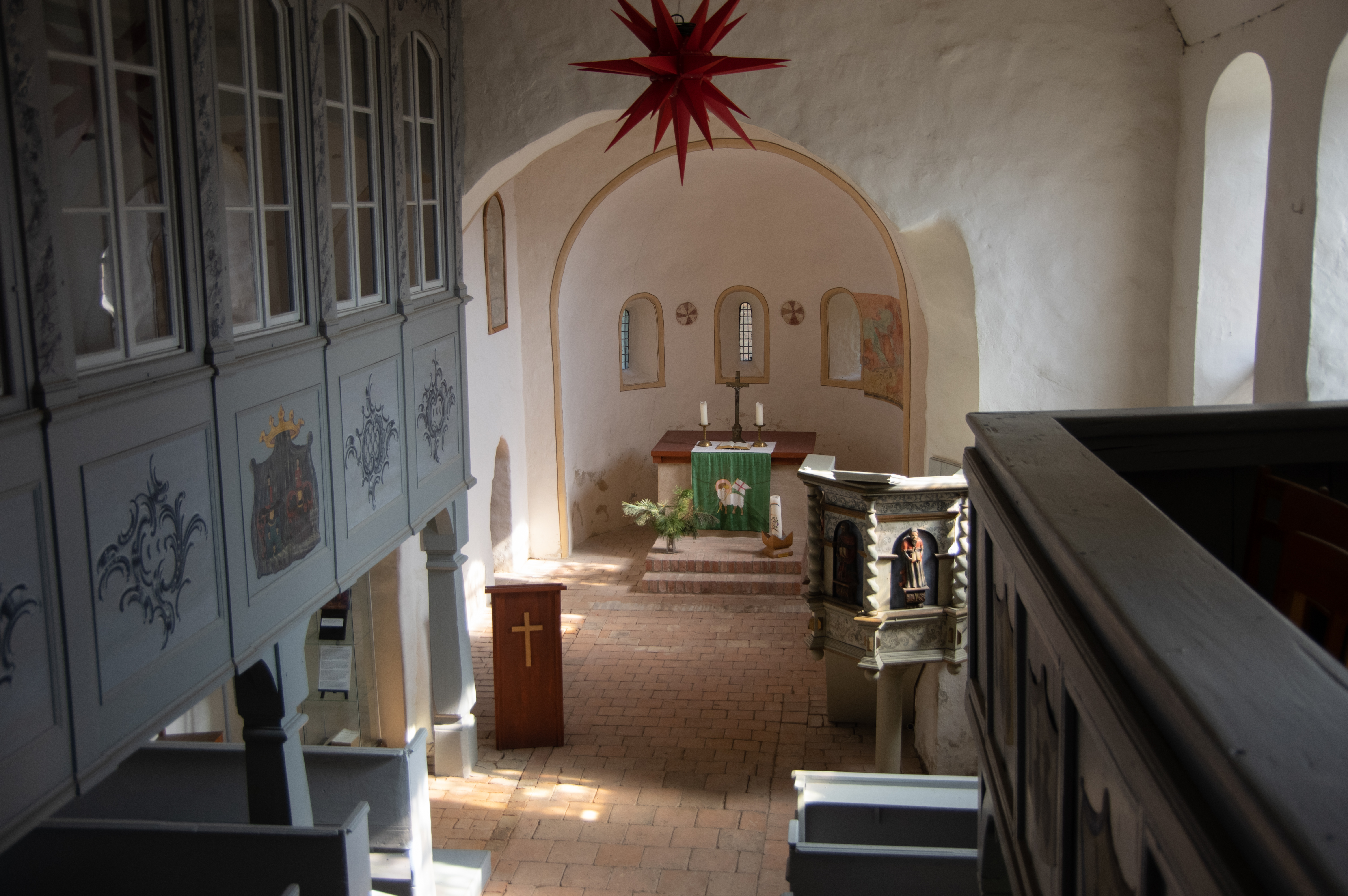 Bad Belzig, Ortsteil Lübnitz in Brandenburg. Die Kirche steht unter Denkmalschutz.